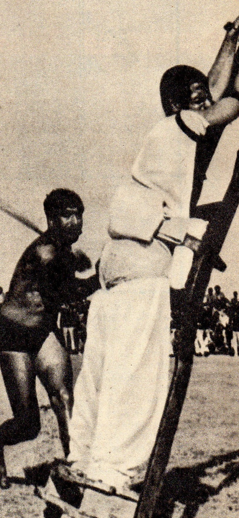 Kara chłosty w islamie. Mężczyzna za uwiedzenie kobiety został wychłostany. Islamabad, lata 70. XX w.